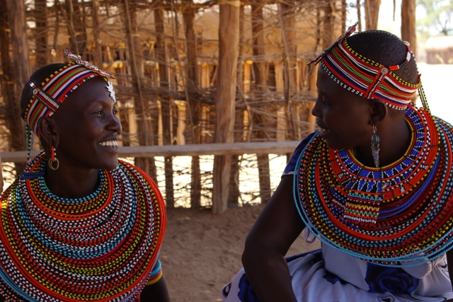 Paulina et Margaret - documentaire Umoja, le village interdit aux hommes de Jean Crousillac et Jean-Marc Sainclair.